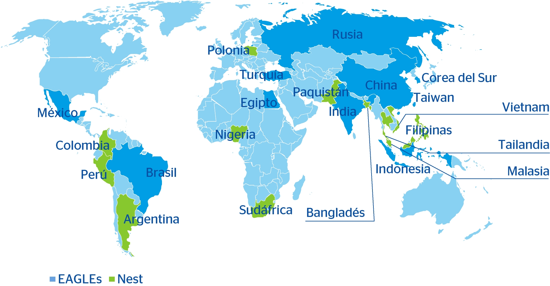 Mapa EAGLEs y Nido EAGLEs